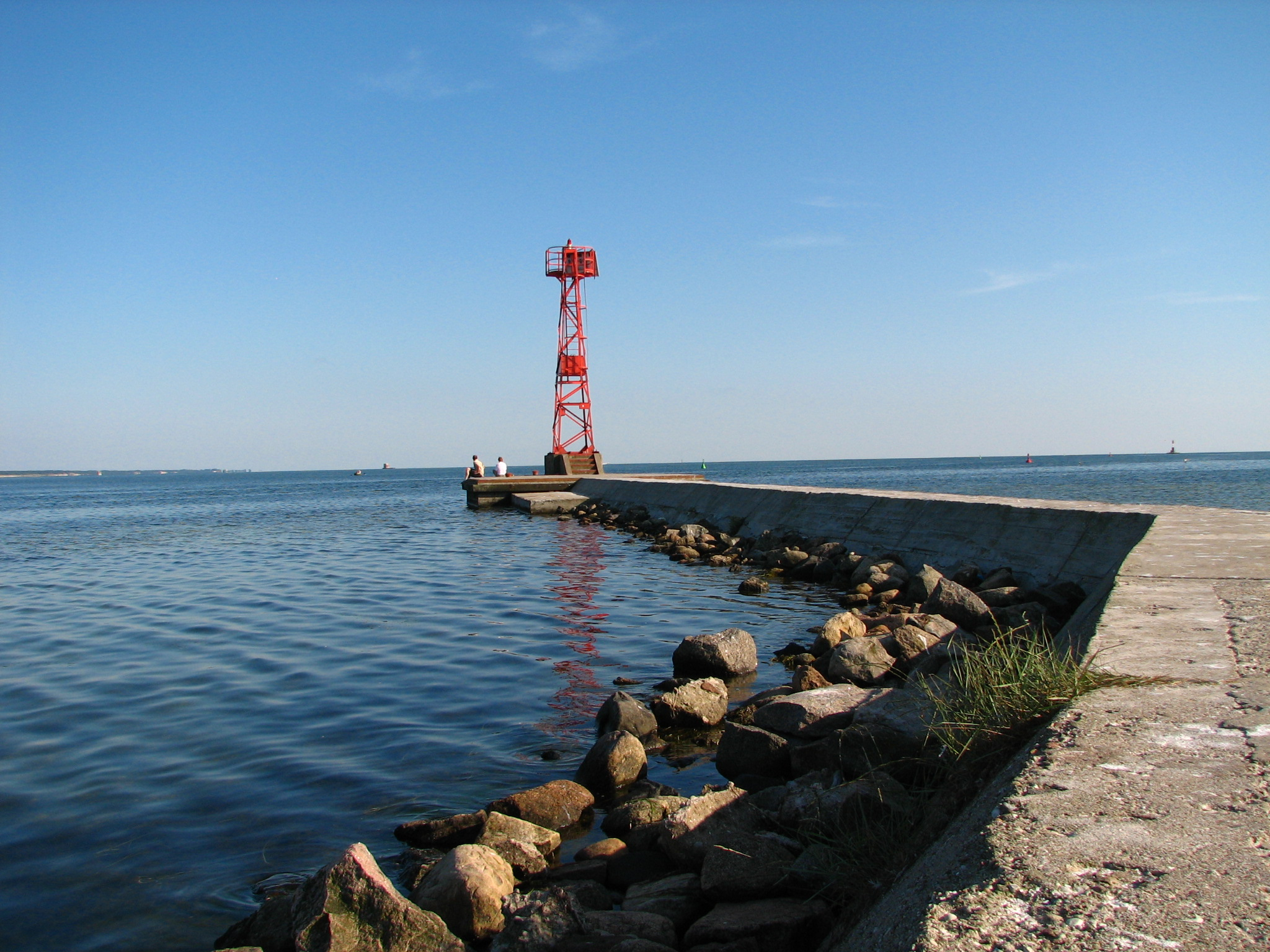 port rybacki